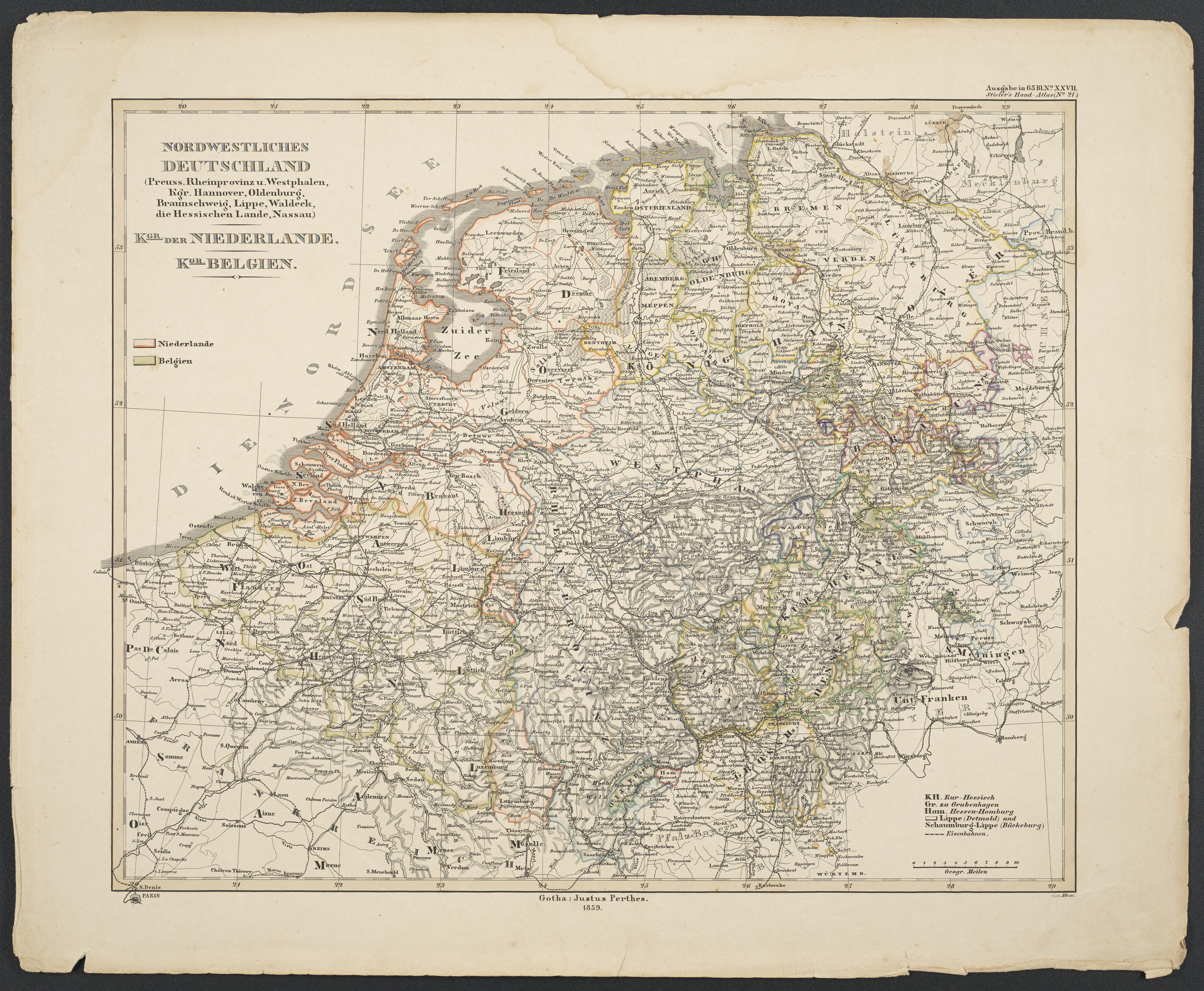 Koordinaten E 2°05'00"-E 11°40'00"/N 53°56'00"-N 48°51'00" ; Maßstab in graph. Form (Geographische Meilen) ; Karte aus Stieler's "Hand-Atlas über alle Theile der Erde nach dem neusten Zustande und über das Weltgebäude" ; 21 (Ausgabe in Bl. No. XXVII)